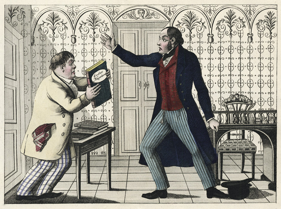 Frontispiz zu: Johann Nepomuk Nestroy: Der Unbedeutende. Posse mit Gesang in drei Akten, Wien 1849 Kupferstich nach einem Aquarell von Johann Christian Schoeller Nestroy als "Zimmermann Peter Span" und Wenzel Scholz als "Sekretär Puffmann", der einen "Codex Napoleon" in Händen hält EA Leopoldstädter Theater 2. Mai 1846